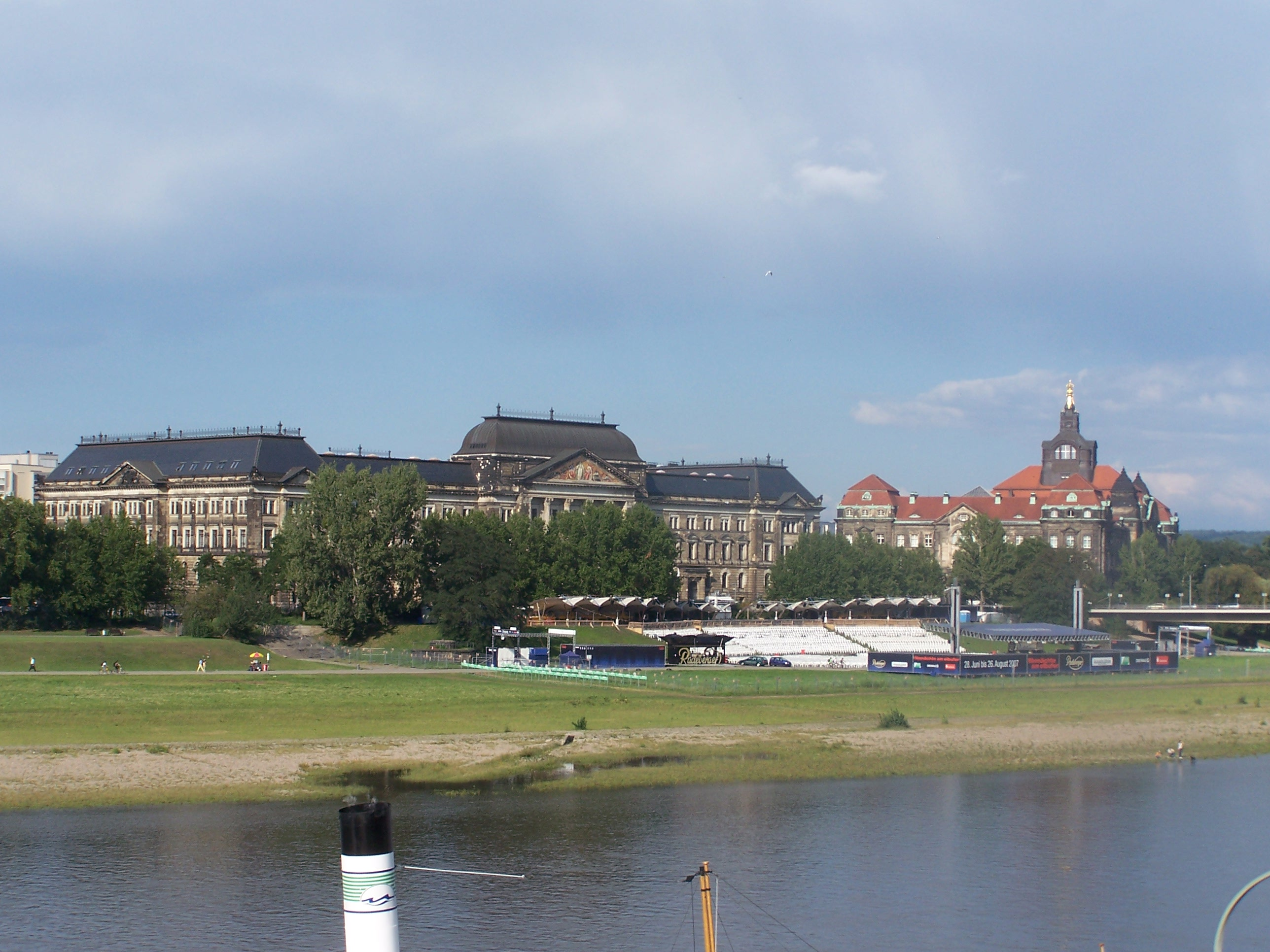 Sächsische Staatsministerien in Dresden